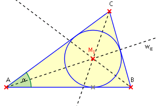 Darstellung zur Verdeutlichung der Informationen zum Schnittpunkt der Winkelhalbierenden bei Dreiecken